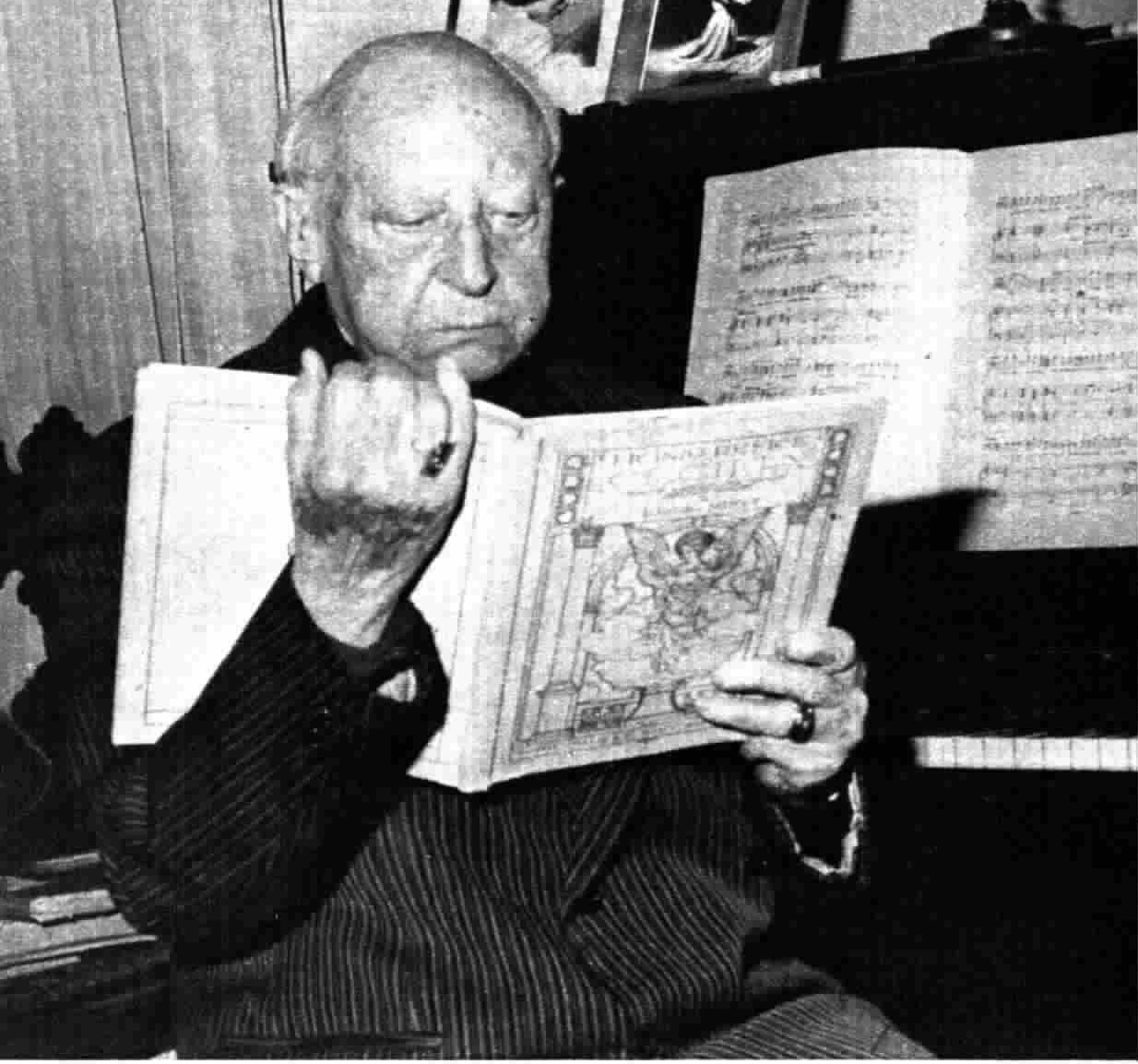 Emidio Mucci (1888-1977), librettista italiano.